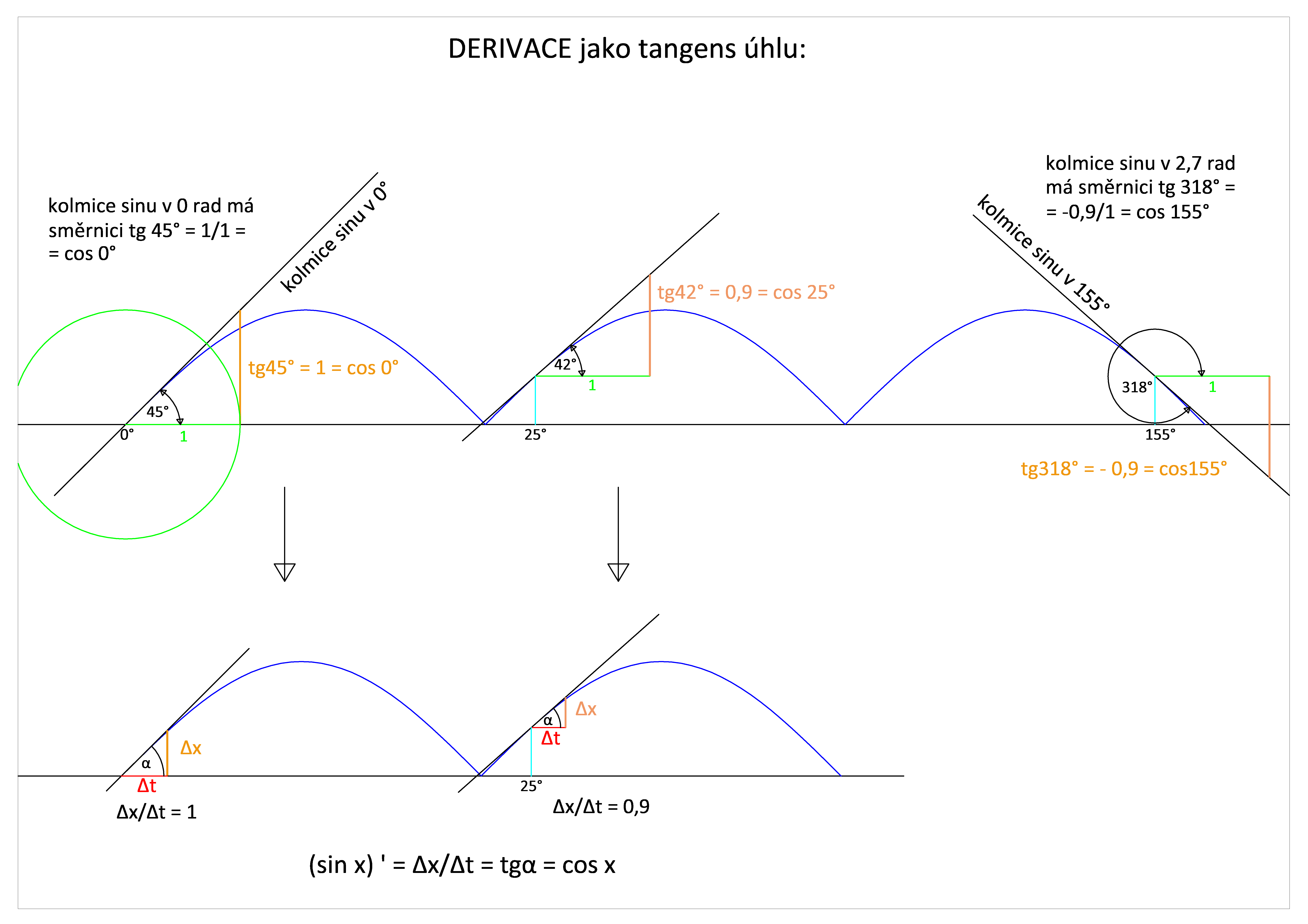 Grafická derivace funkce sinus v bodě, pomocí tečny. Vysvětlení pojmu derivace funkce.